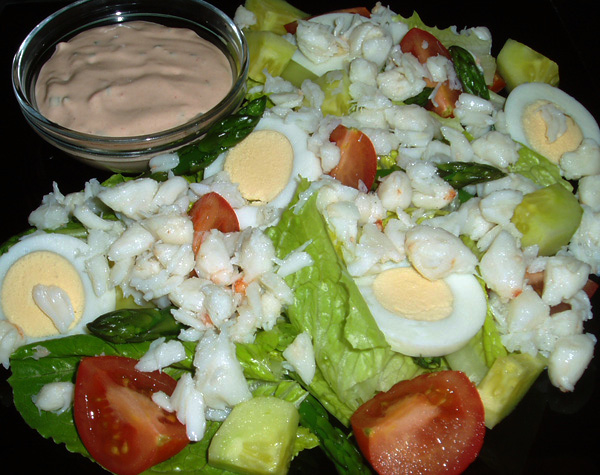 Crab Louie salad